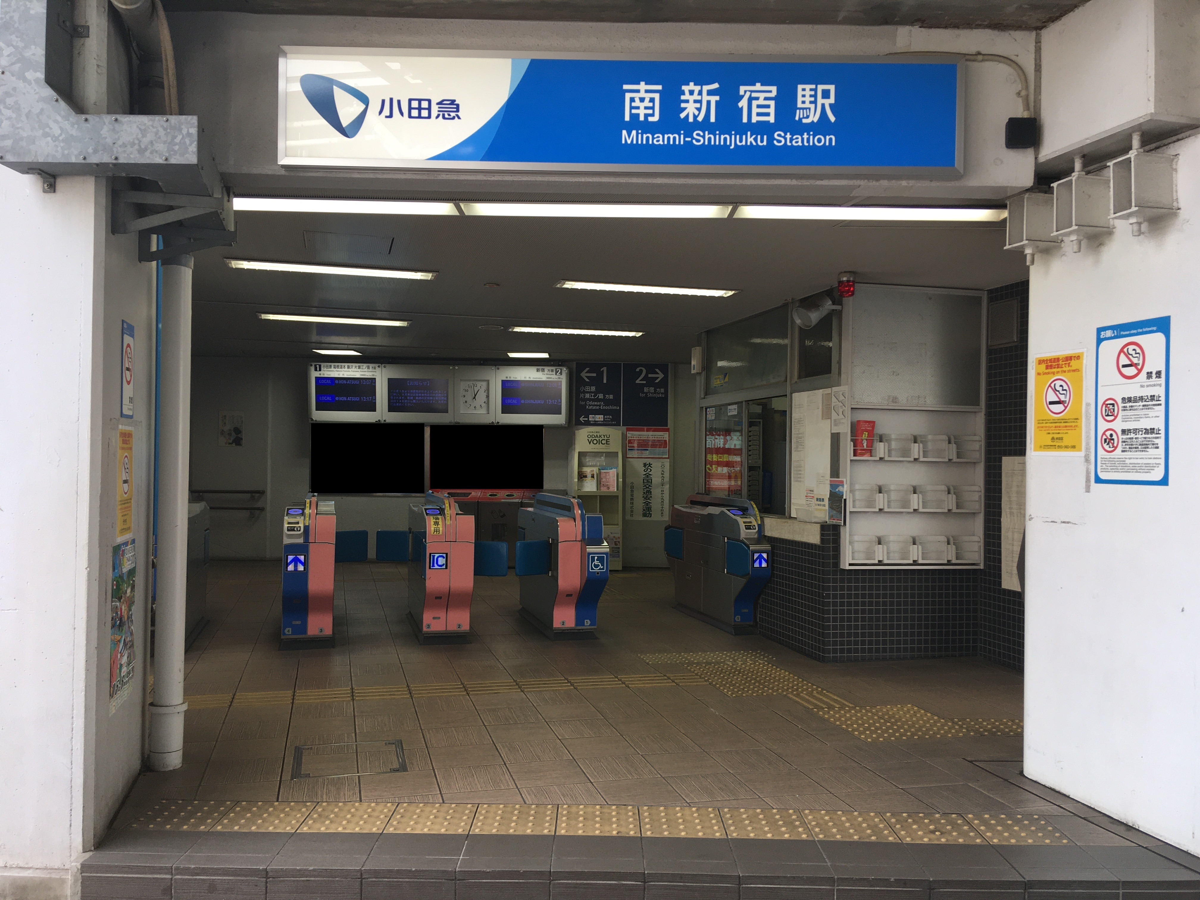 駅改札口。